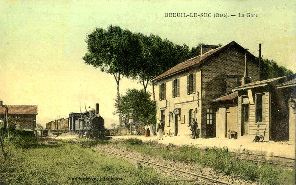 Train de voyageurs arrivant en gare.